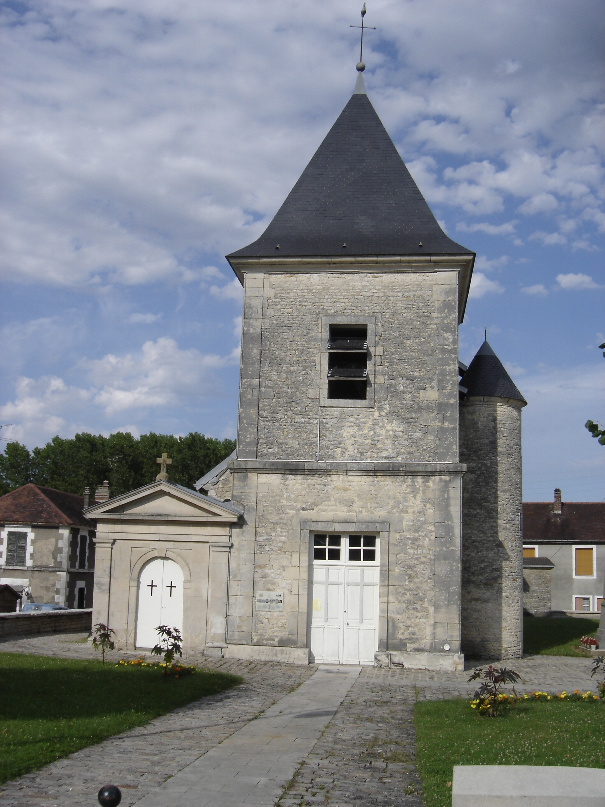 église Saint Pierre ès liens de Jessains (Aube, France).